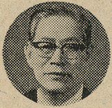 대한민국의 정치인